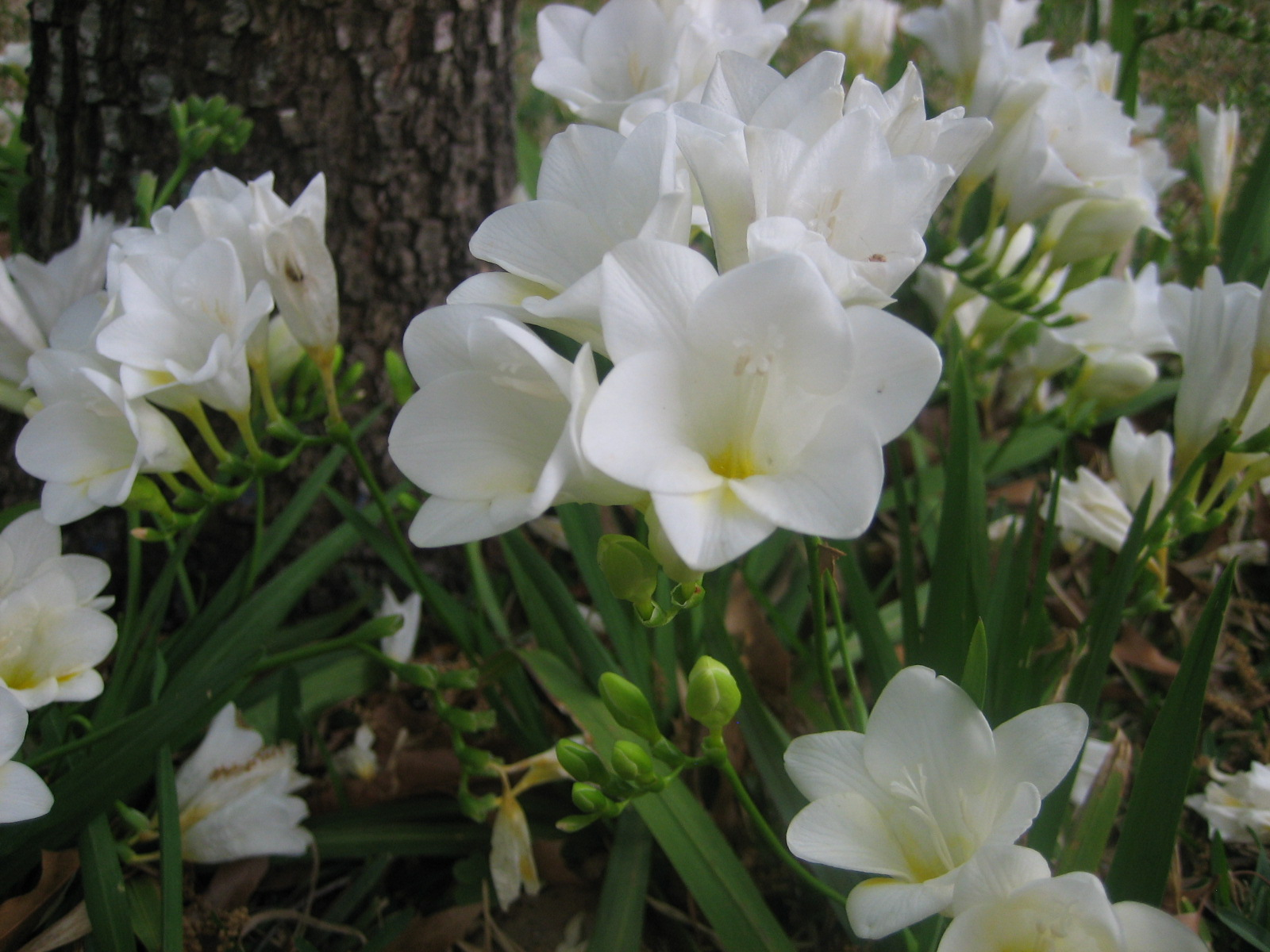 Freesia ×hybrida